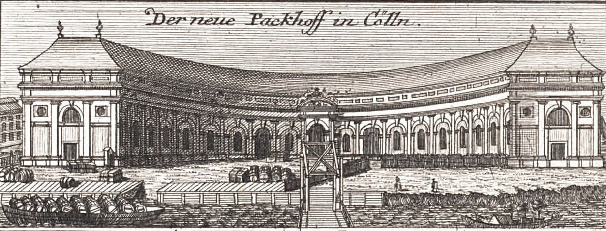 Ansicht des Berliner Neuen Packhofs 1757